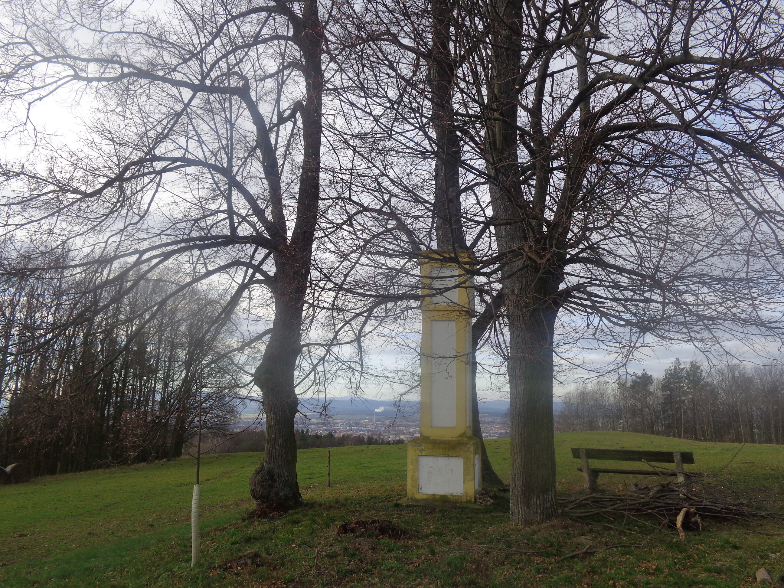 Kaplička na Dlouhém vrchu